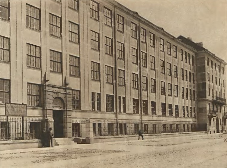 Budynek szkoły przy ul. Bema 76 w Warszawie, widok od strony ul. Bema